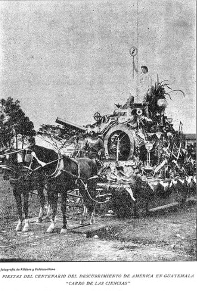 Carroza de "Las Ciencias" en el desfile de conmemoración del IV Centenario del Descubrimiento de América en la Ciudad de Guatemala. Revista Guatemala Ilustrada, 1892.